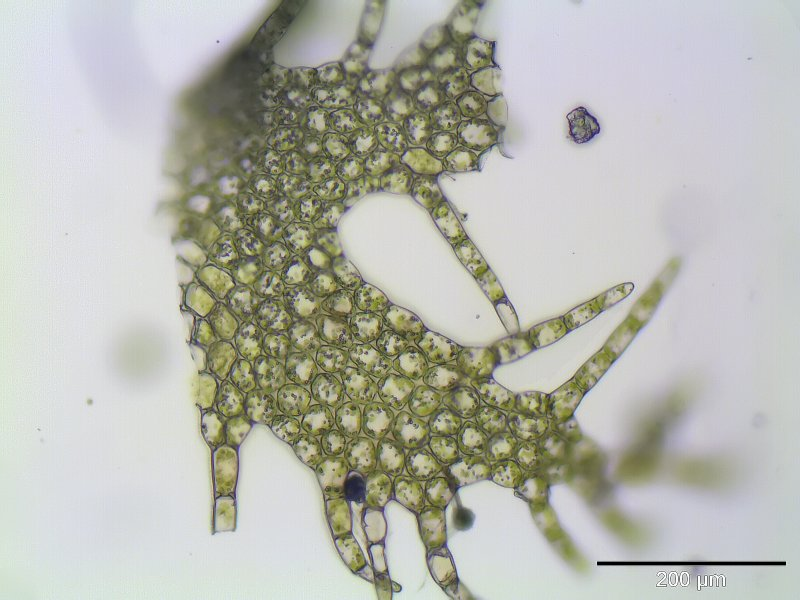 Schönes Federchenmoos (Ptilidium pulcherrimum), Leaf, 125x